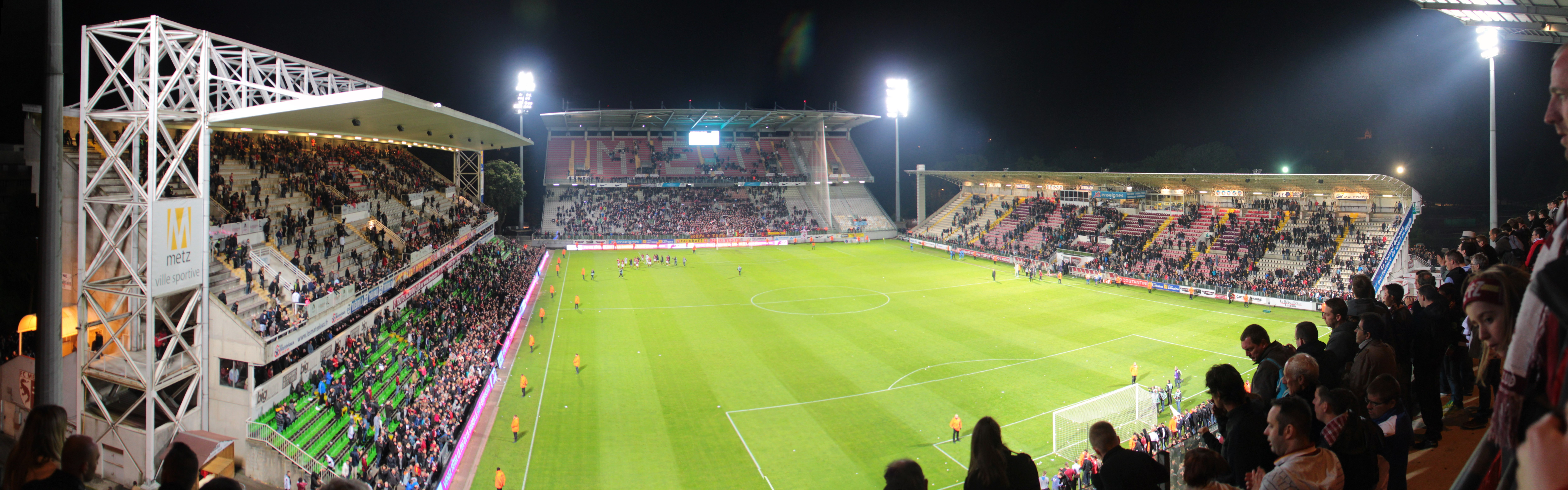 FC Metz